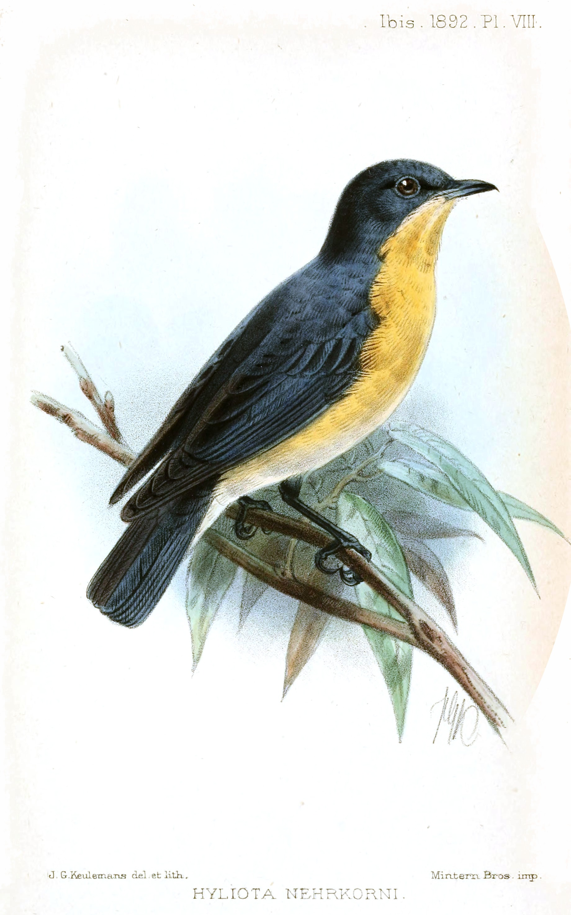 Hyliota nehrkorni (=Hyliota violacea nehrkorni)